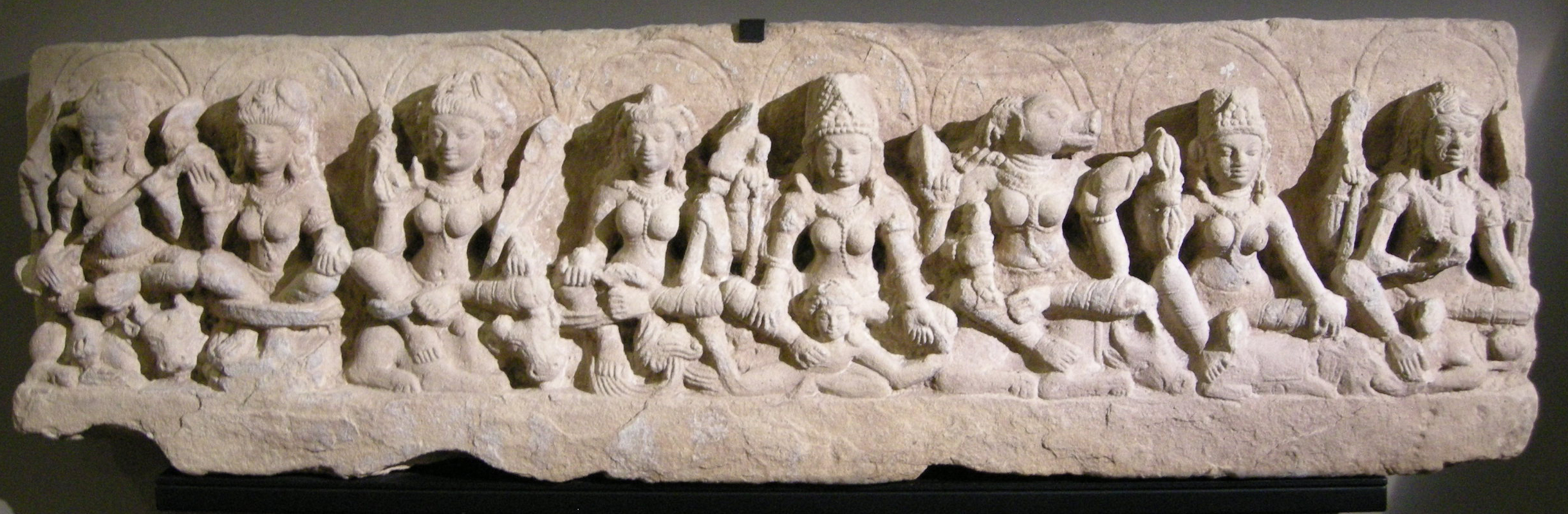 India settentrionale, saptamatrika, X sec